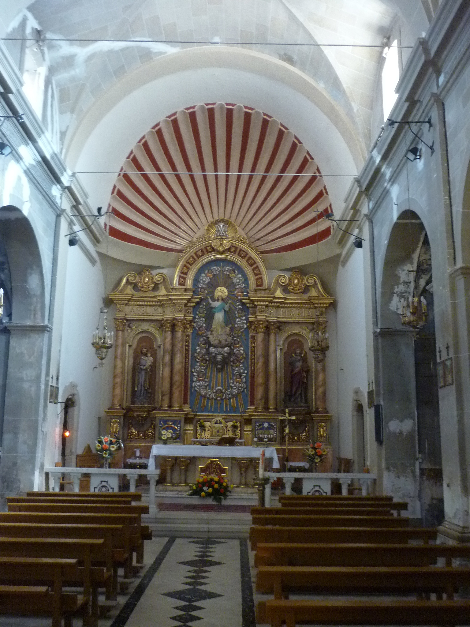 Església parroquial de Sant Bartomeu d'Hostafrancs (els Plans de Sió): interior